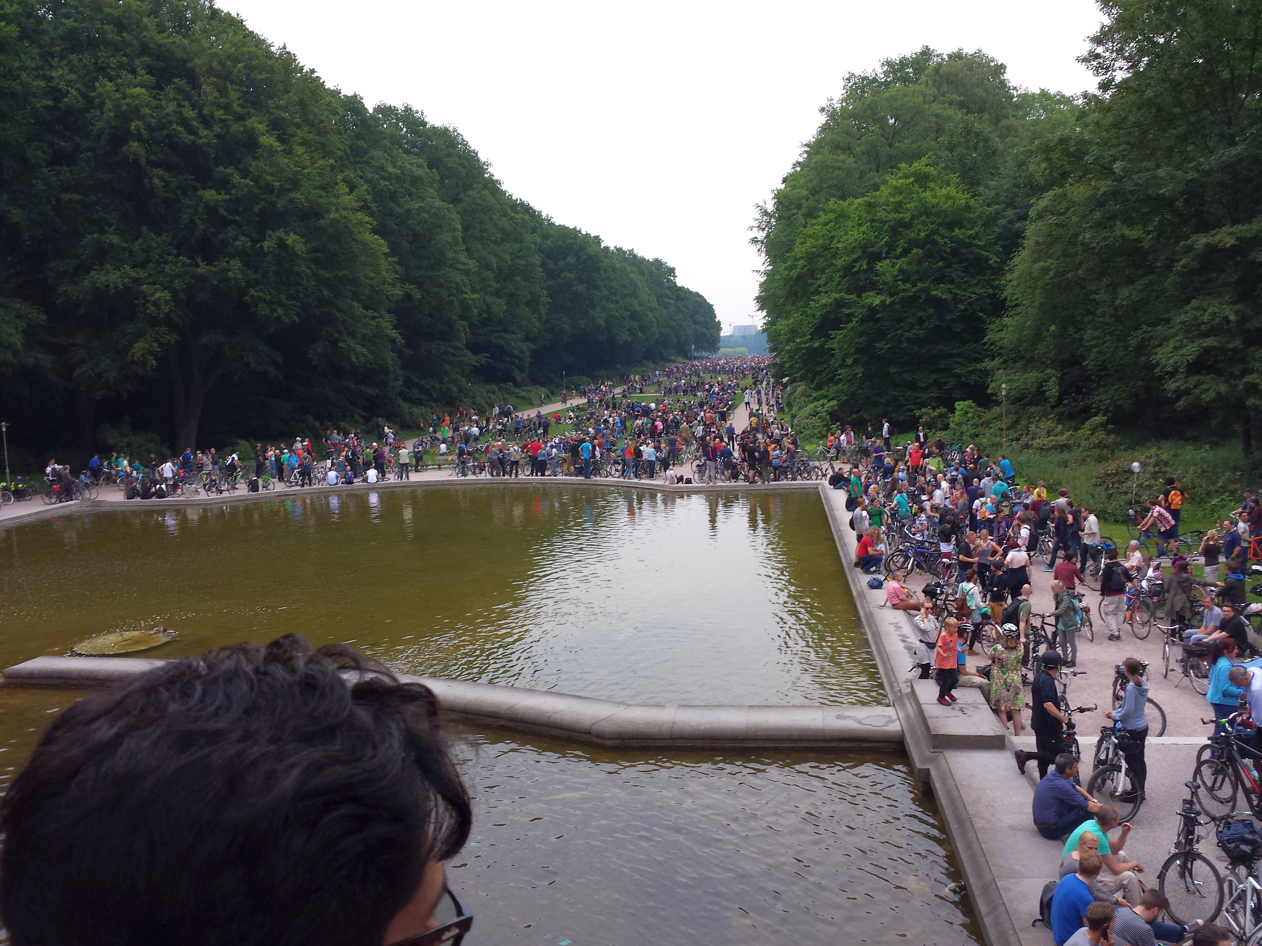 Critical-Mess-Treffpunkt in Hamburg am Planetarium im Stadtpark am 26. Juni 2015